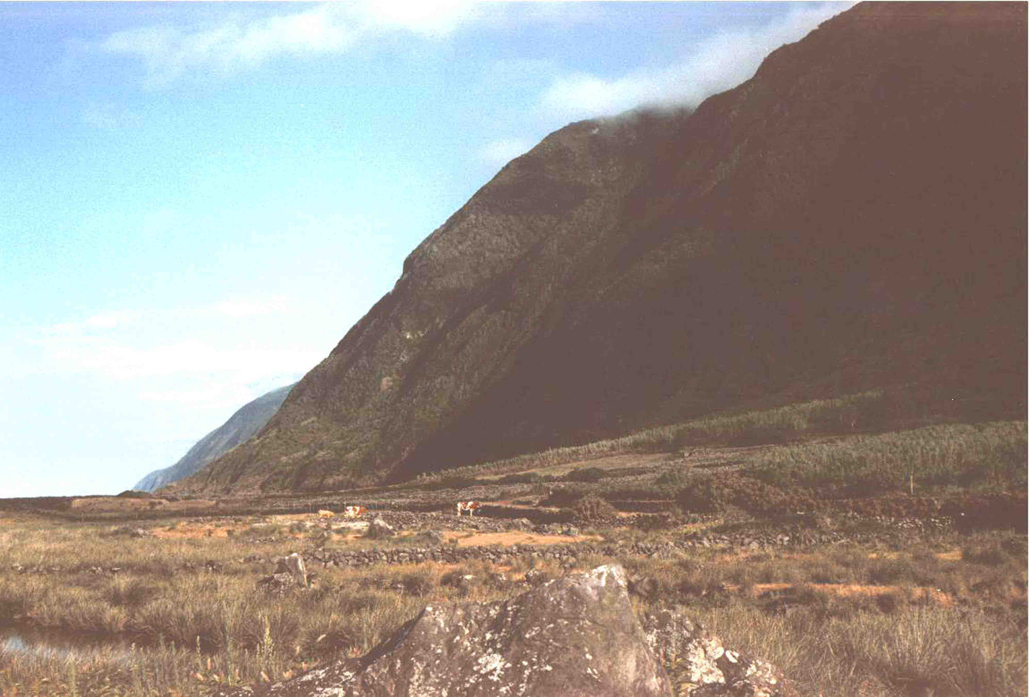 Fajã dos Cubres, Ilha de São Jorge, Açores.